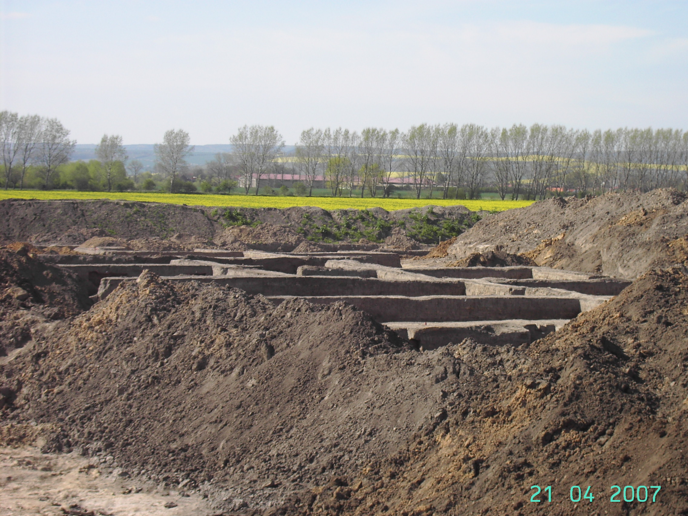 Archäologische Ausgrabung bei Oberröblingen